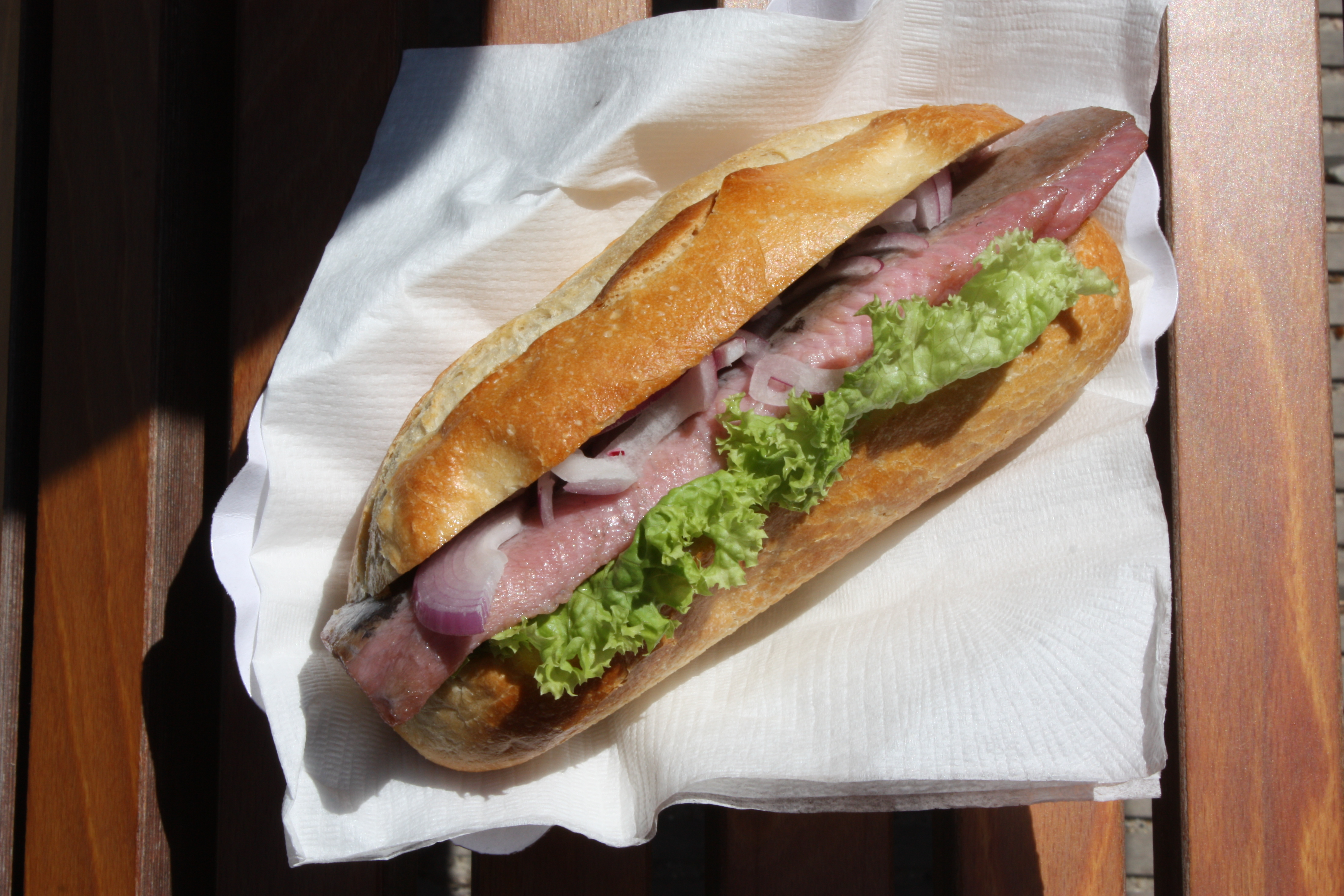 Timmendorfer Strand